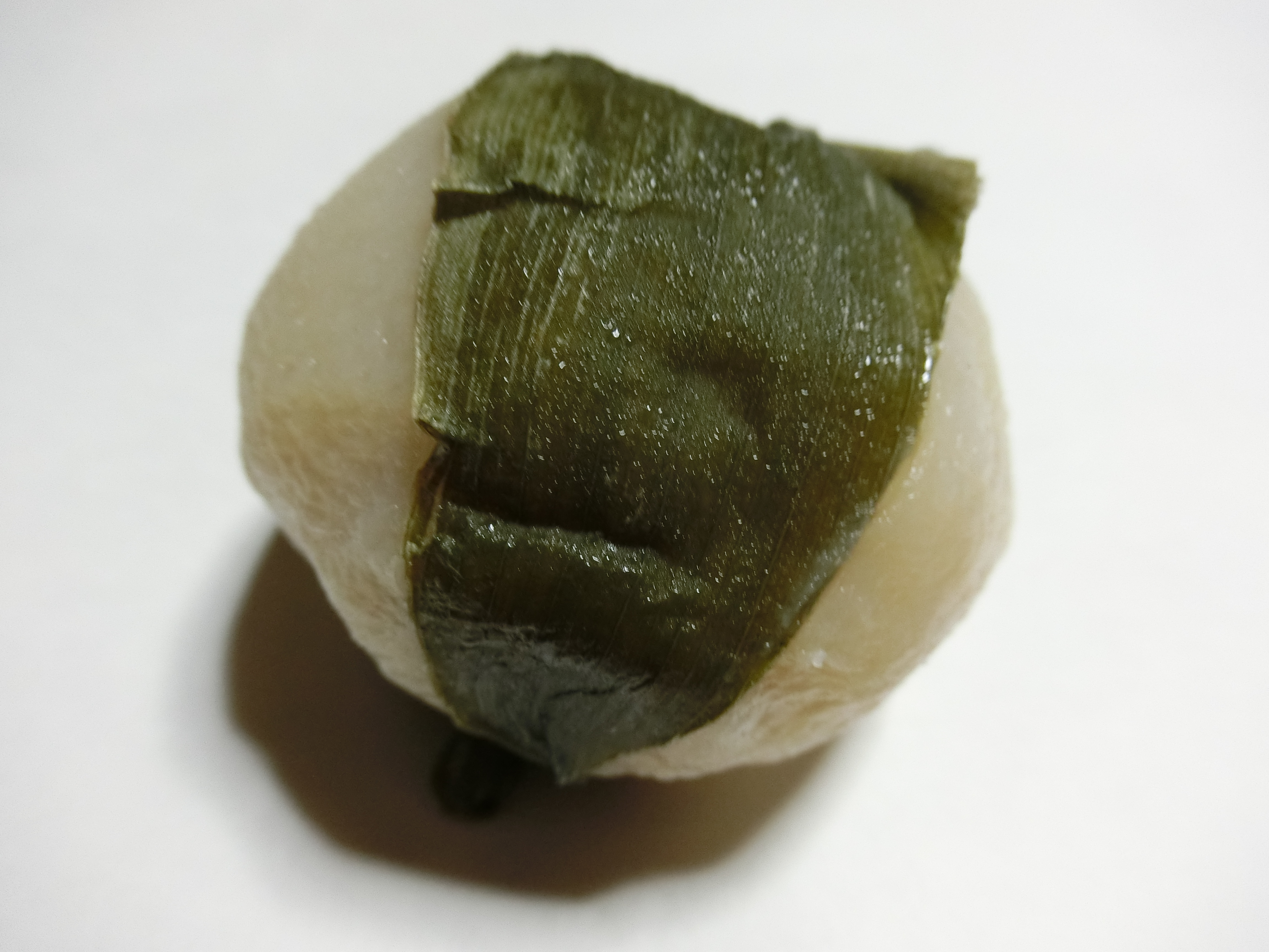 岐阜県本巣郡発祥の和菓子